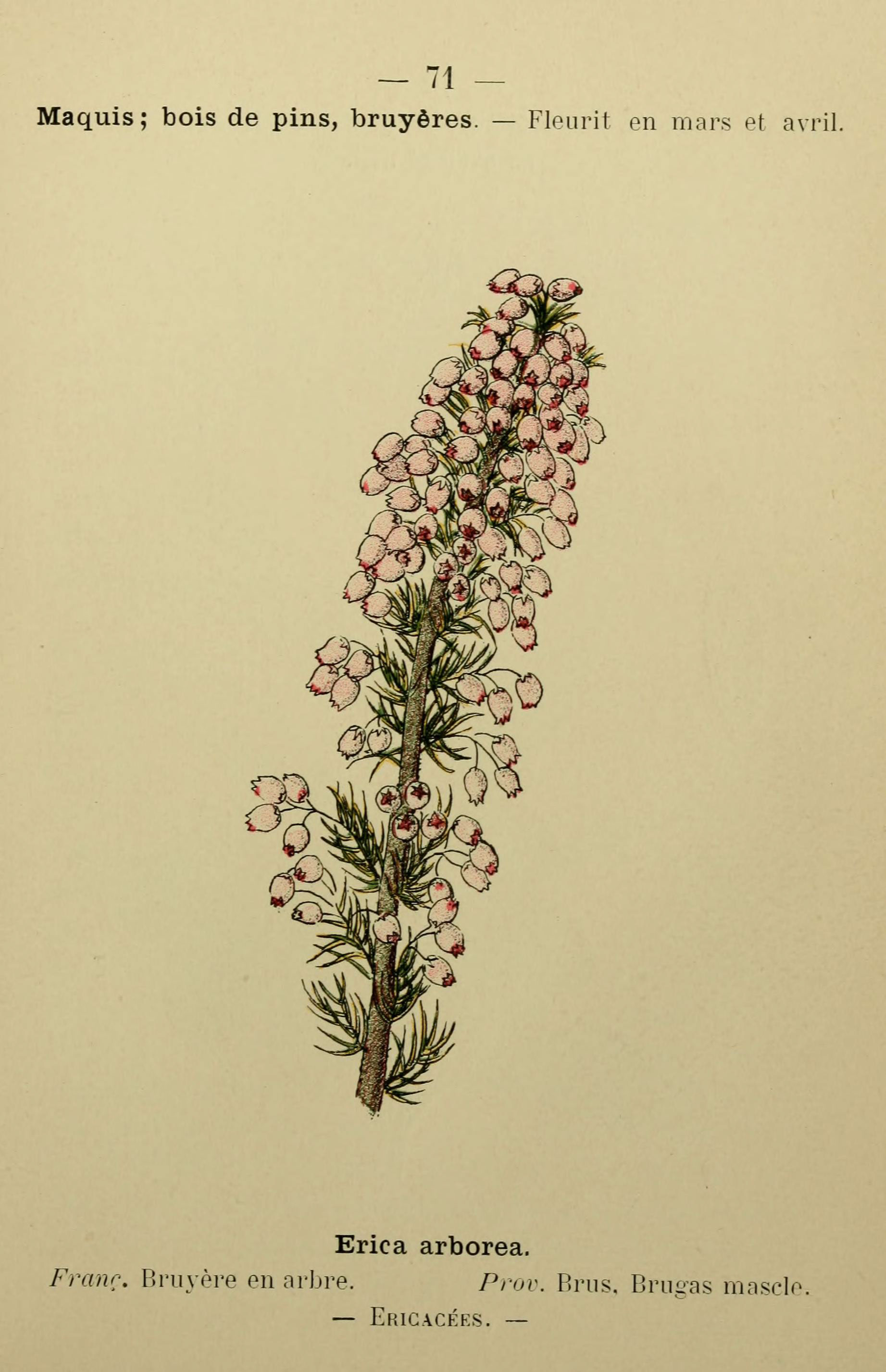 — 71 — Maquis; bois de pins, bruyères. — Fleurit en mars et avril. Erica arborea. Franc. Bruyère en arbre. Prov. Brus. Brûlas mascle. — Ericacées. —